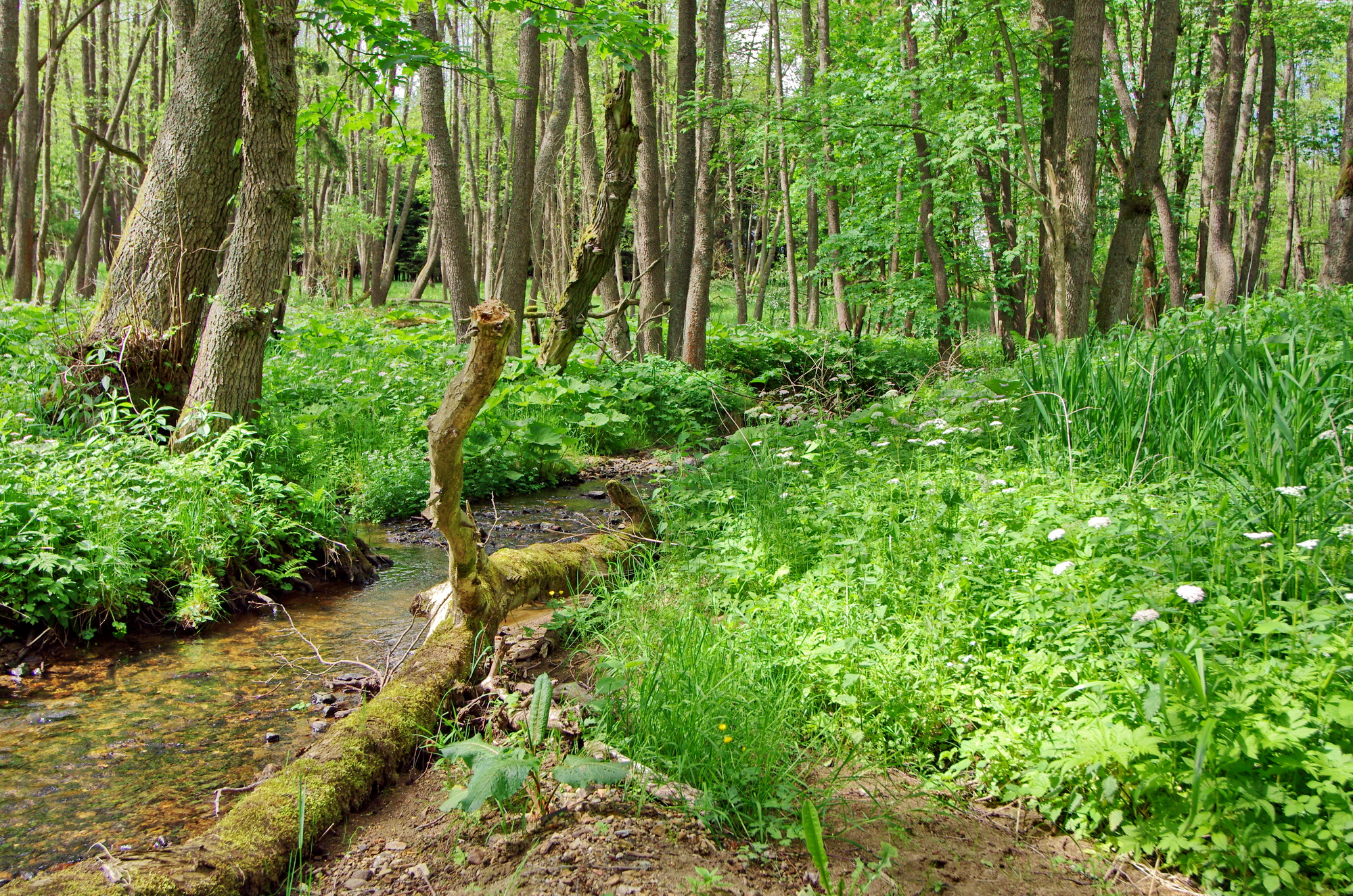 Jilmový potok v místě u přírodní památky Milhostovské mofety, okres Cheb